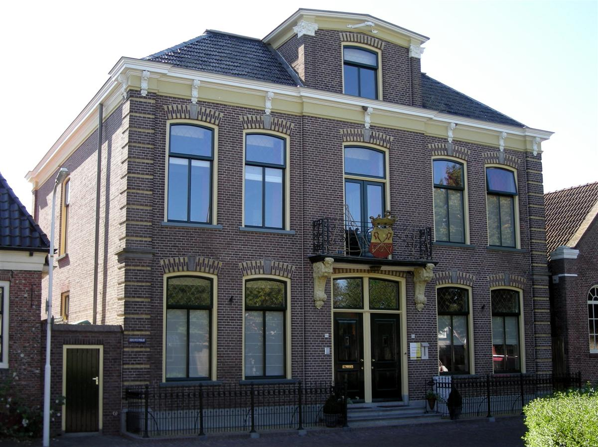 Voormalig stadhuis Stavoren